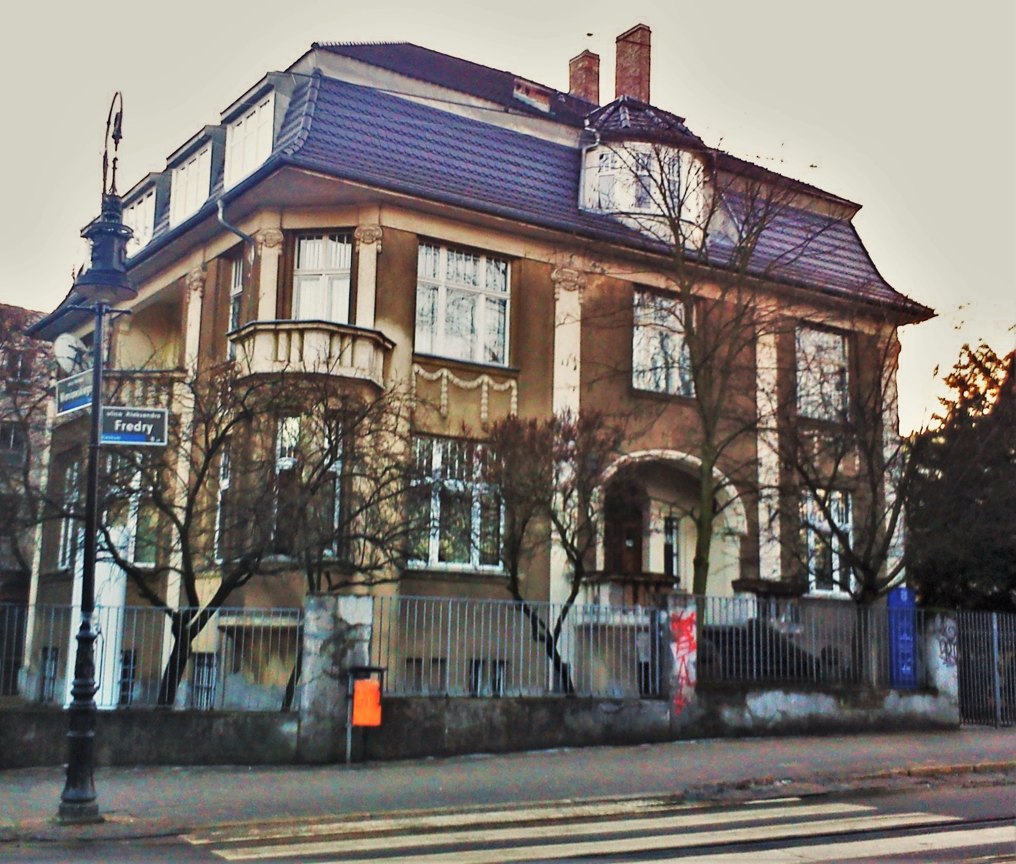 Willa Adolfa Landsberga, Poznań. Ul. Fredry.